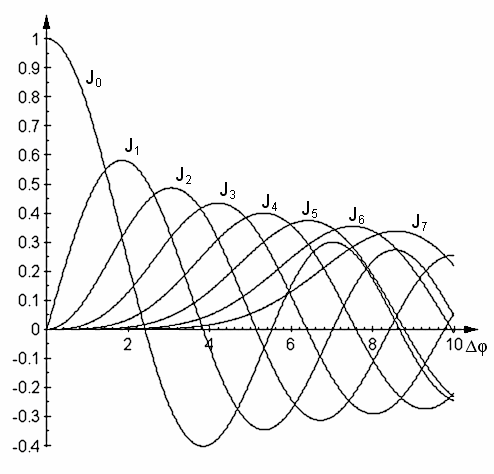 Besseldiagramm